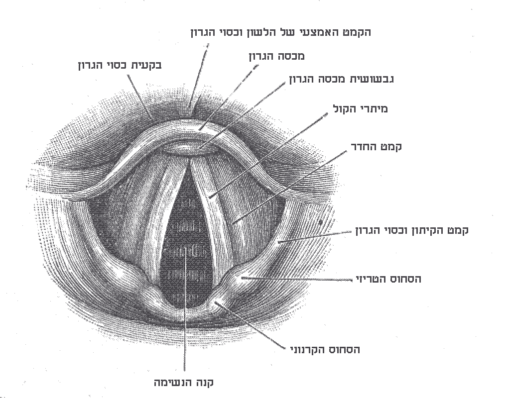 איור של מראה אנדוסקופי של בית הקול הסבר אנטומי של בית הקול